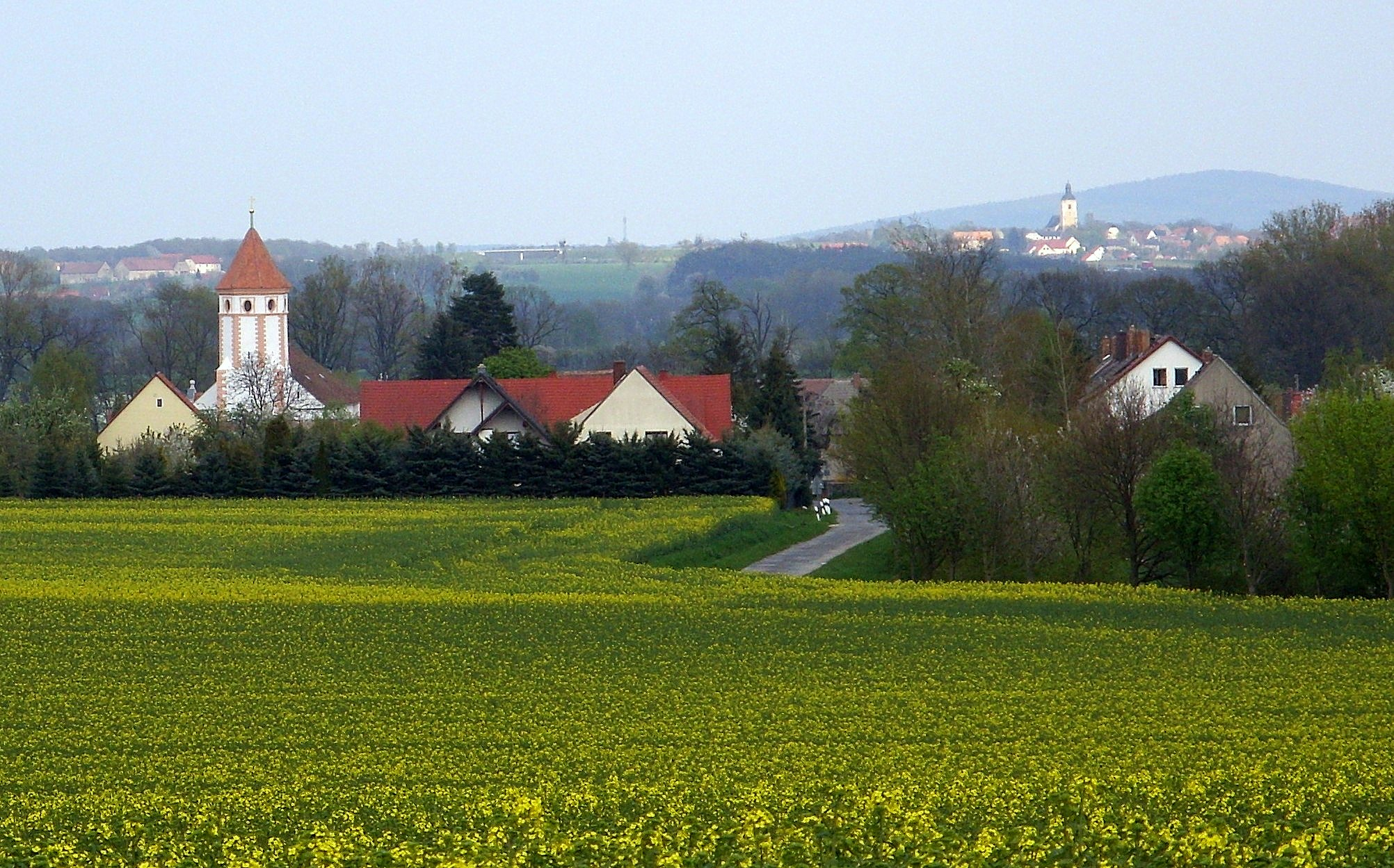 Blick von den Kreckwitzer Höhen auf Kleinbautzen und Gröditz (im Hintergrund). Hornjoserbsce: Napohlad Budyšinka a Hrodźišća (w pozadku) z Krakečanskich hórkow